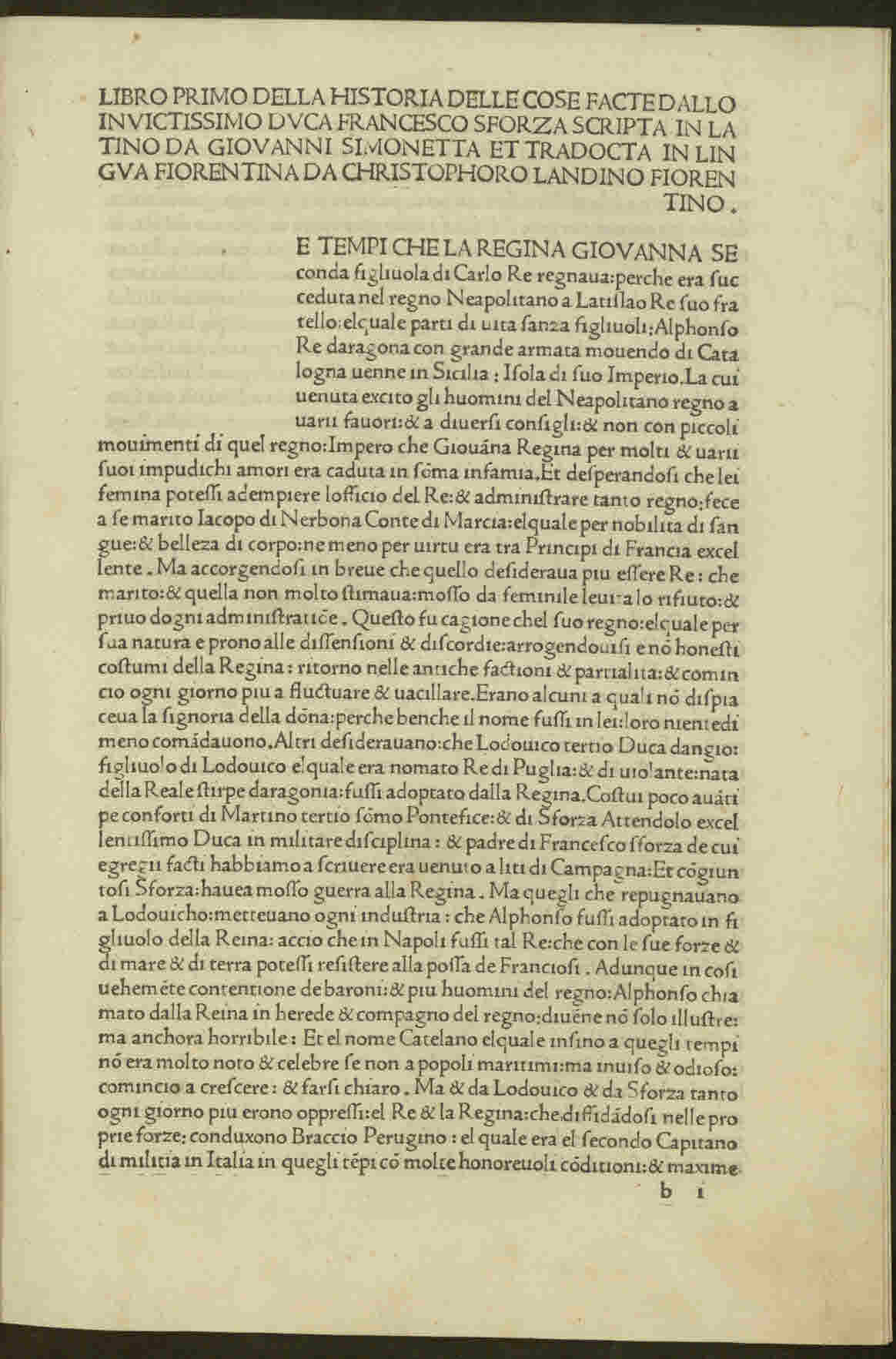 Commentarii rerum gestarum Francisci Sfortiae (italiano). - In Milano : Antonio Zarotto Parmesano, nelli anni del Signore MCCCCLXXXX. - 202 c. ; a⁴, b-z⁸, &⁸, [us]⁸, [rum]⁴ ; fol. - Manca la c. [rum]4 (bianca) .